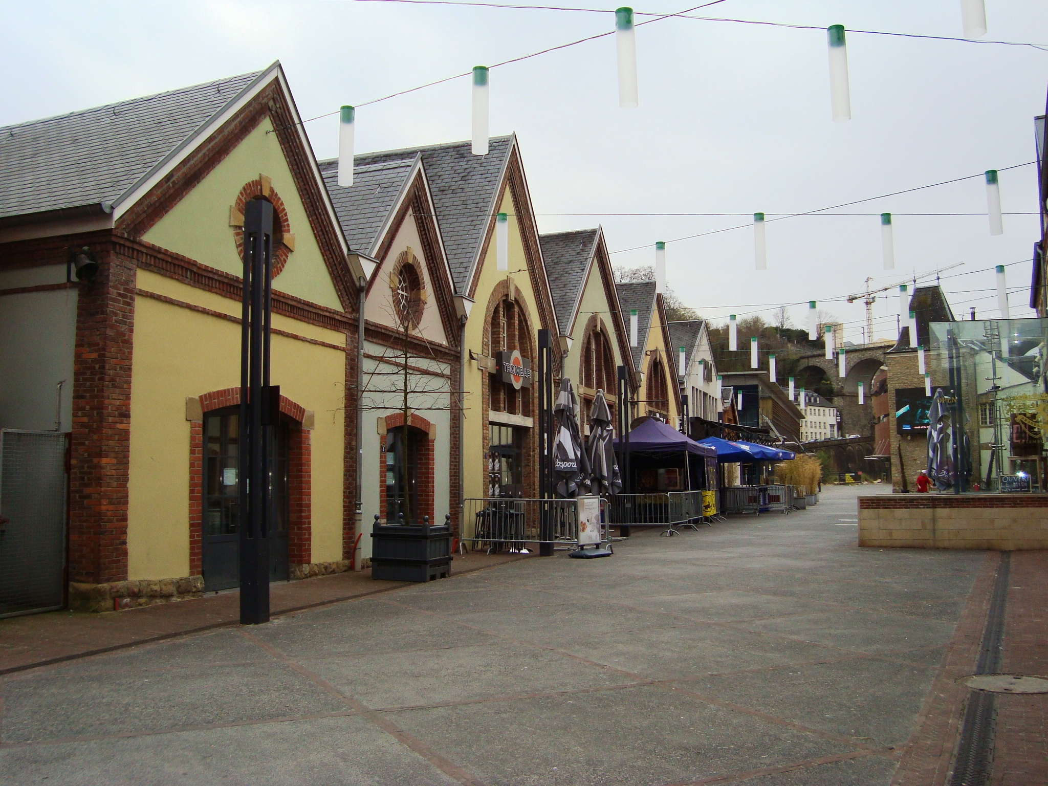 Vue sur les rives de Clausen, autrefois la brasserie de Mousel.